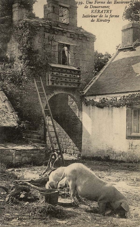 Les restes du manoir de Keratry (devenu une simple ferme) vers 1930.